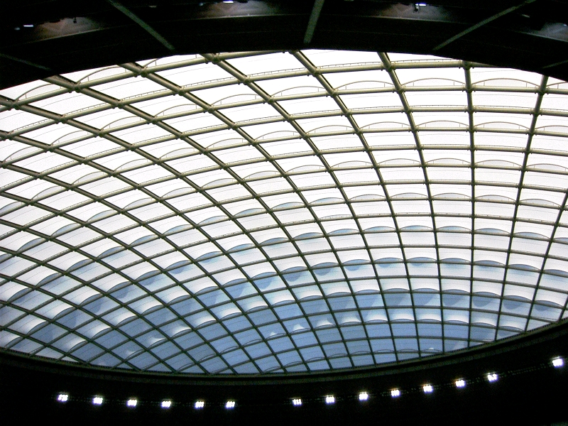 “Seibu Dome” Seibu Lions professional baseball team located in Tokorozawa, Saitama, Japan. “西武ドーム” 日本の埼玉県所沢市にあるドーム式野球場。日本のプロ野球パリーグに加盟する、西武ライオンズのホーム球場でもある。西武ドームの屋根部分を撮影。